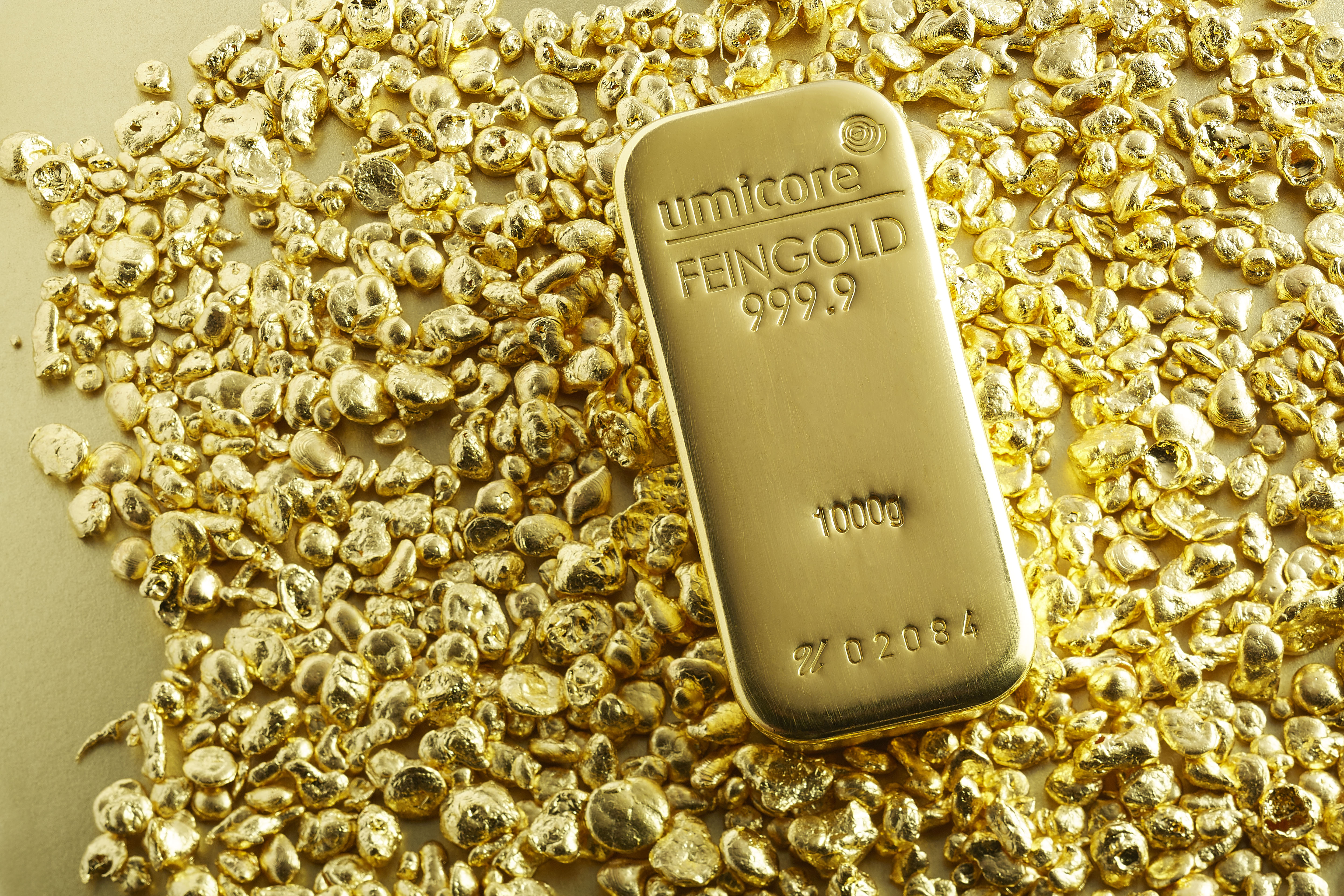 Seit 2017 tragen die Barren ein neues Umicore-Logo.